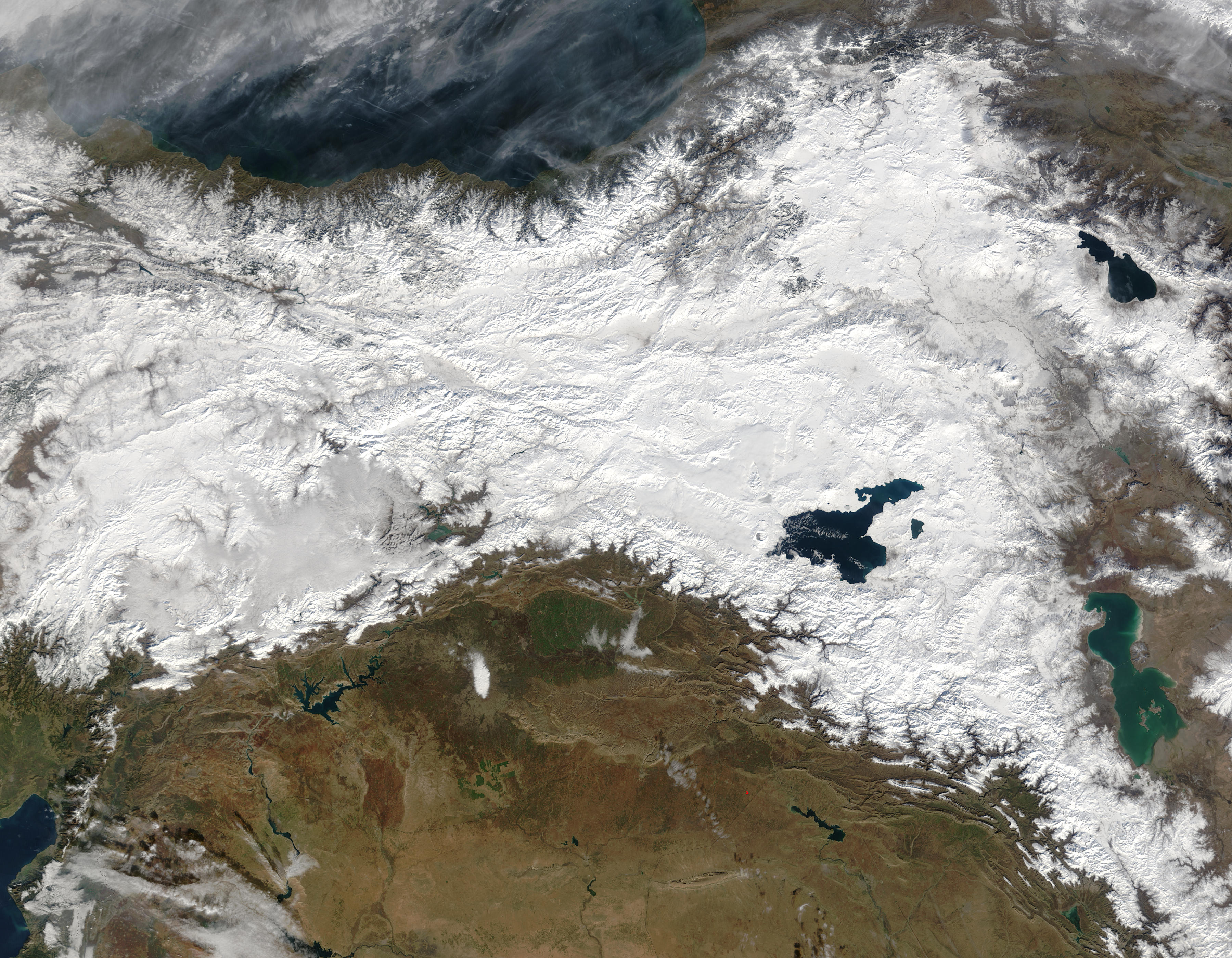 Doğu Anadolu Bölgesi karlar altında.